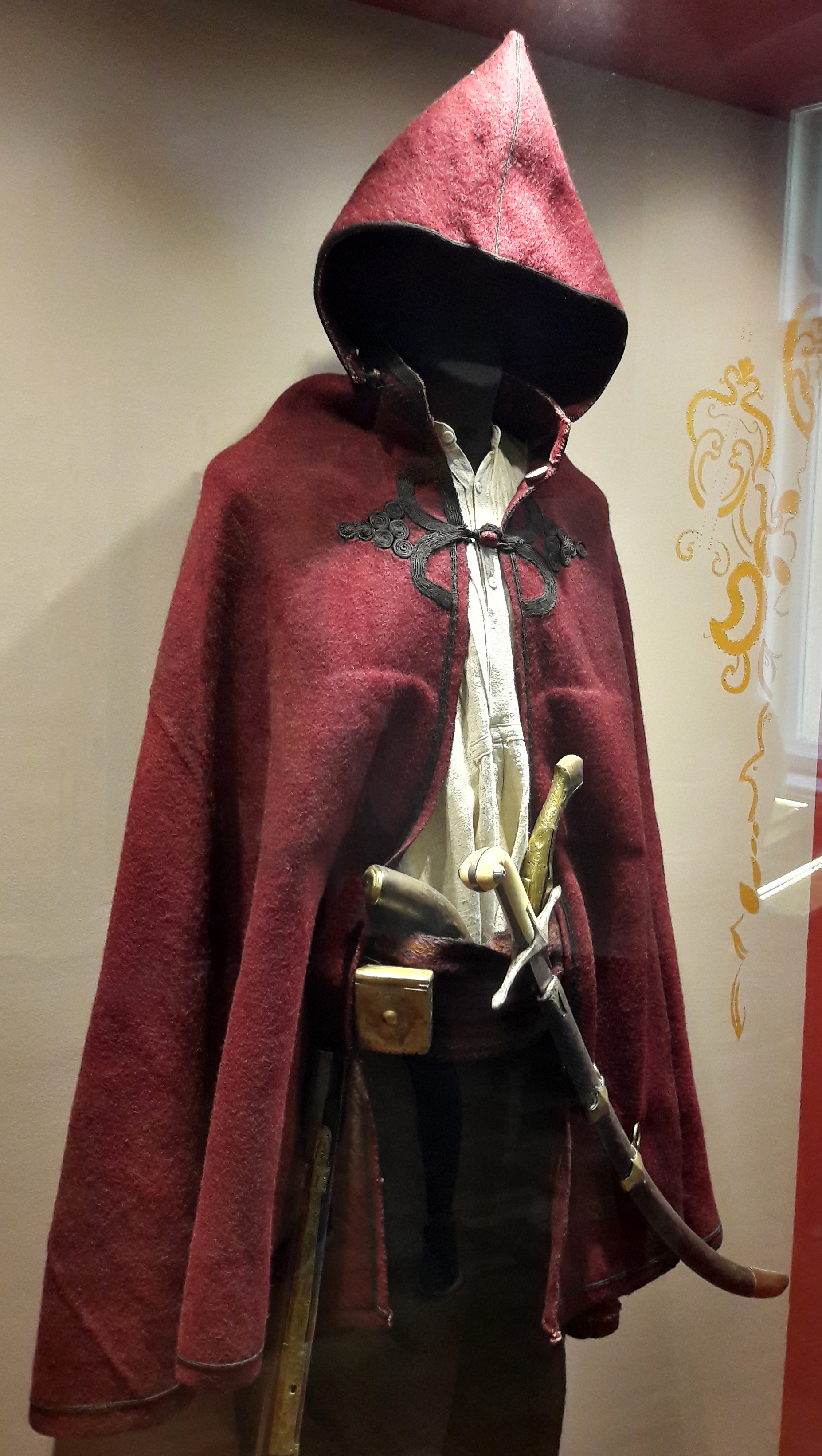 Crvena kabanica muške narodne nošnje izložene u okviru stalne psotavke Narodnog muzeja Kruševac.